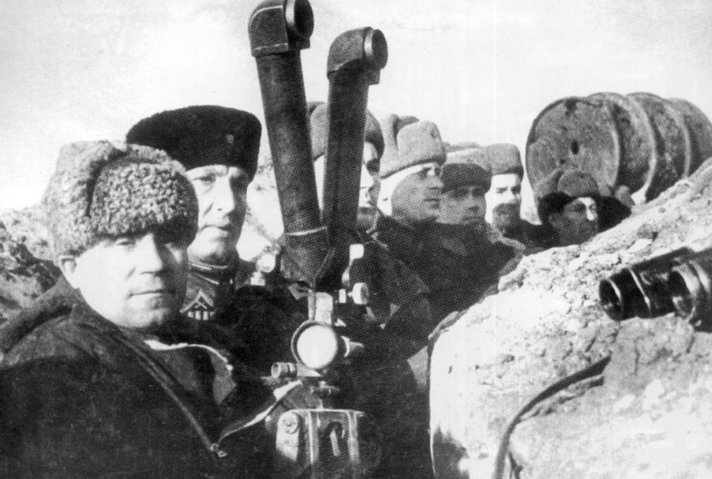 Командир 39-й стрелковой дивизии генерал-майор С.С. Гурьев (на переднем плане) на наблюдательном пункте в Сталинграде. 1943 год